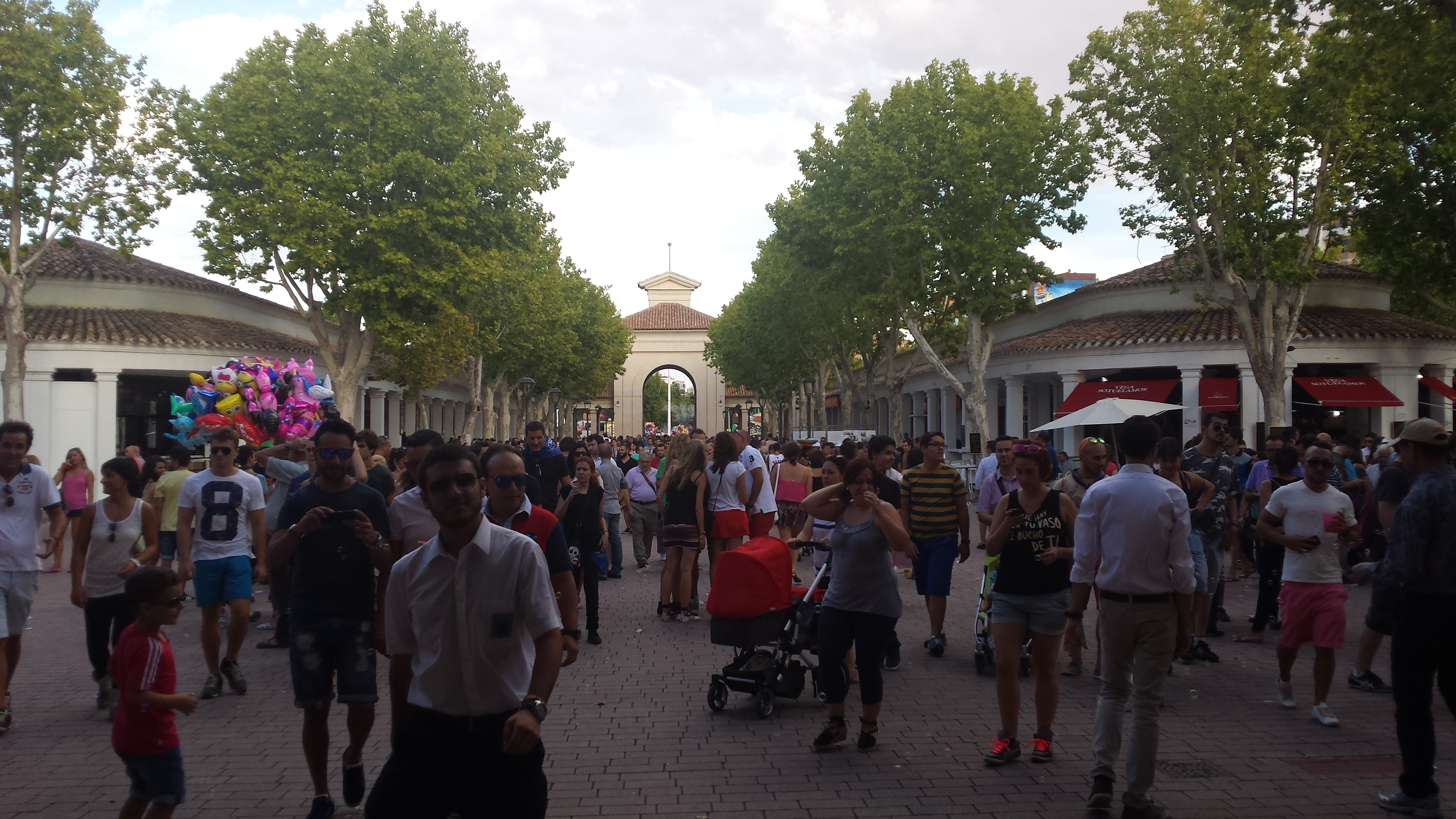 Paseo Central del Rabo de la Sartén del Recinto Ferial de Albacete. Puerta de Hierros de Albacete. Barrio Feria. Albacete